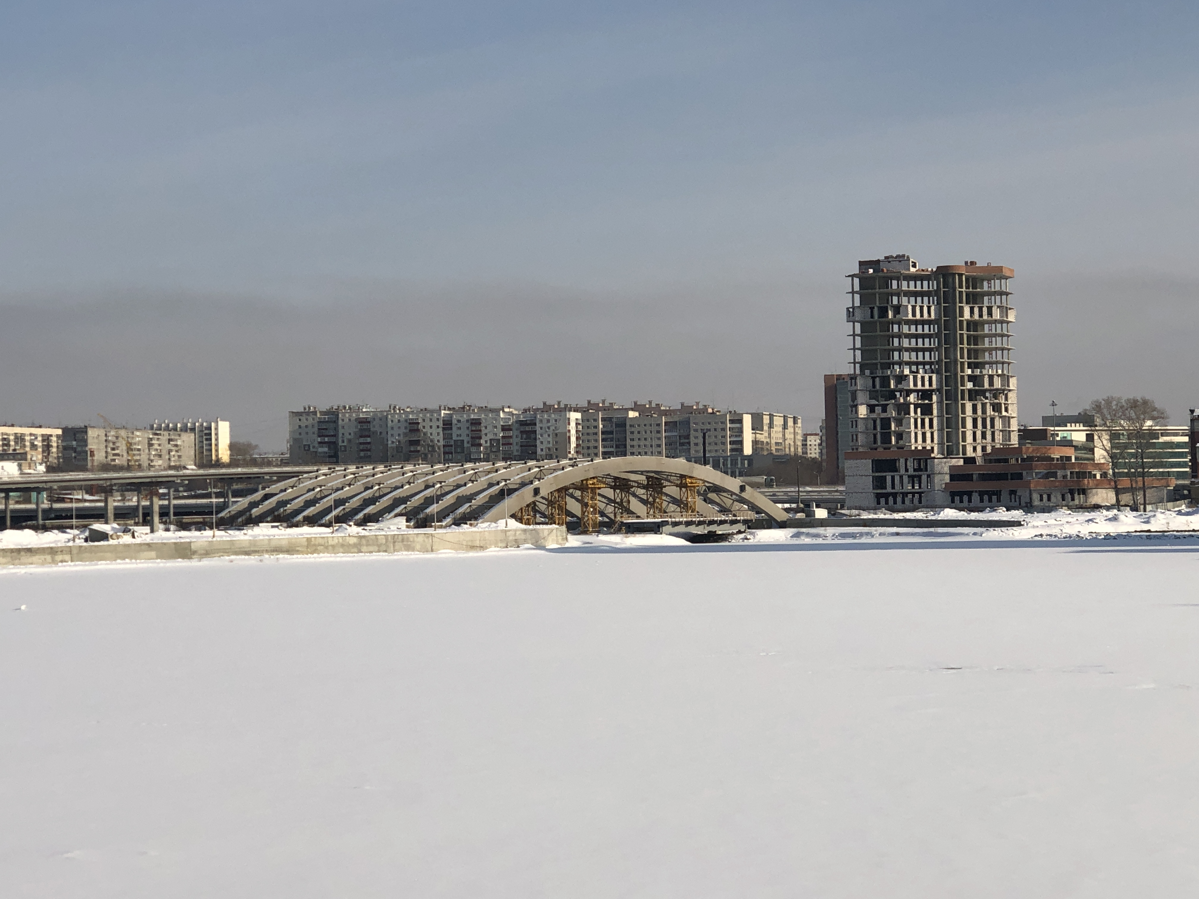 Приостановленное строительство Конгресс-холла Крылья